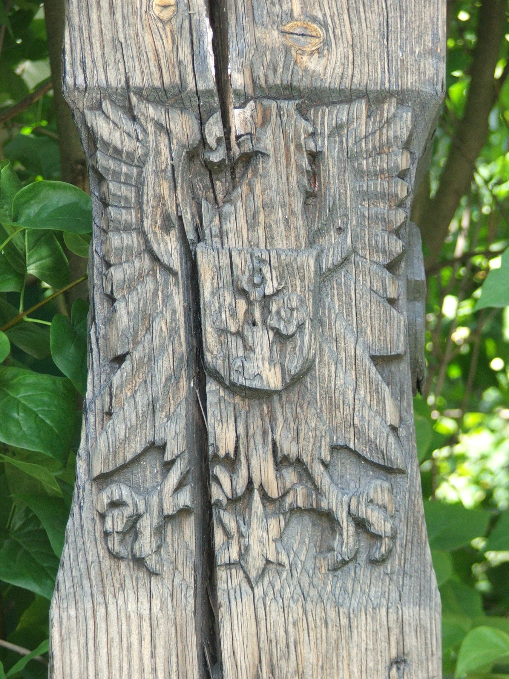 Herb Namysłowa na pruskiej drewnianej lampie gazowej; Coats of arms of Namysłów